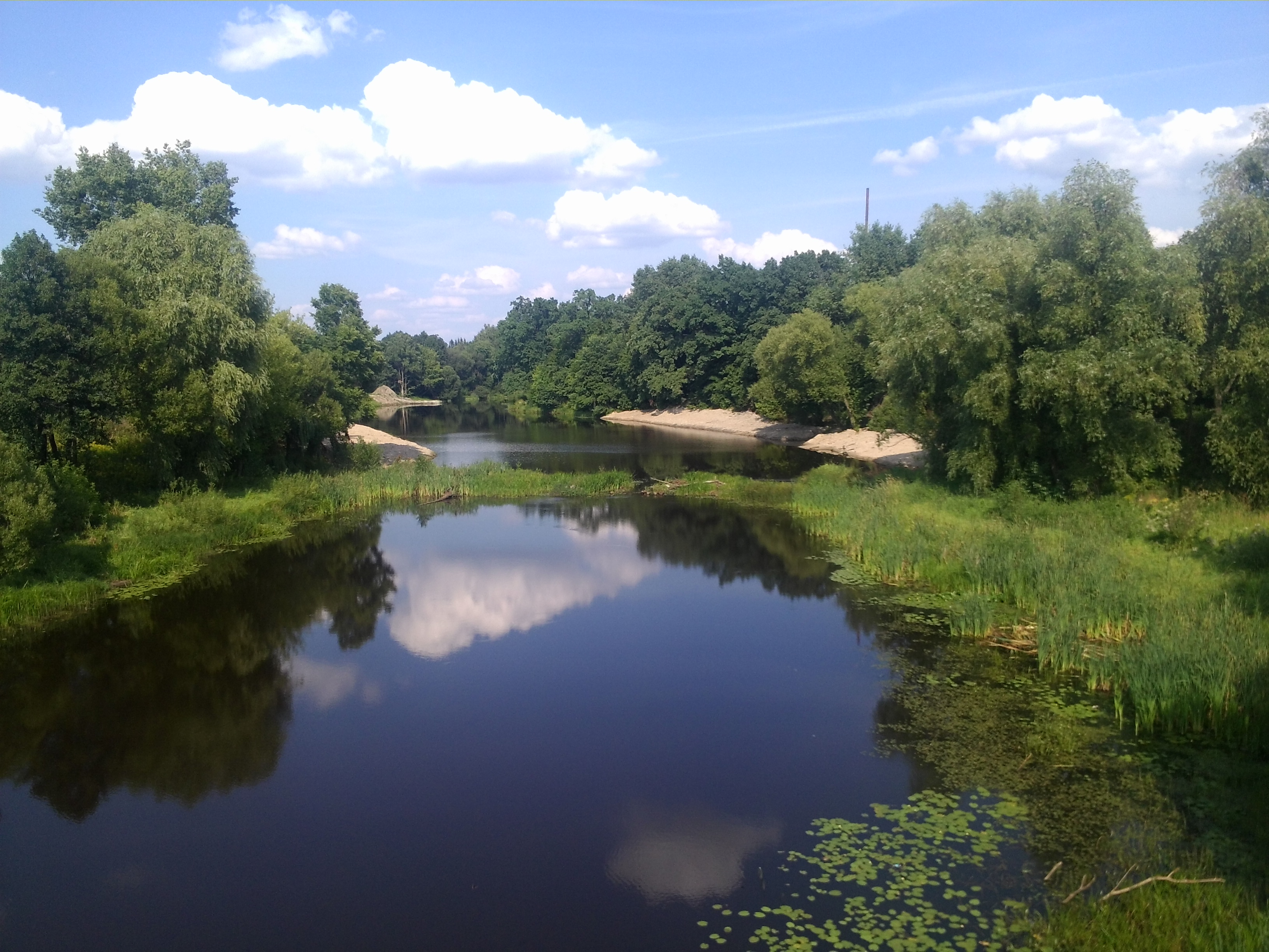 Річка Уборть в Олевську